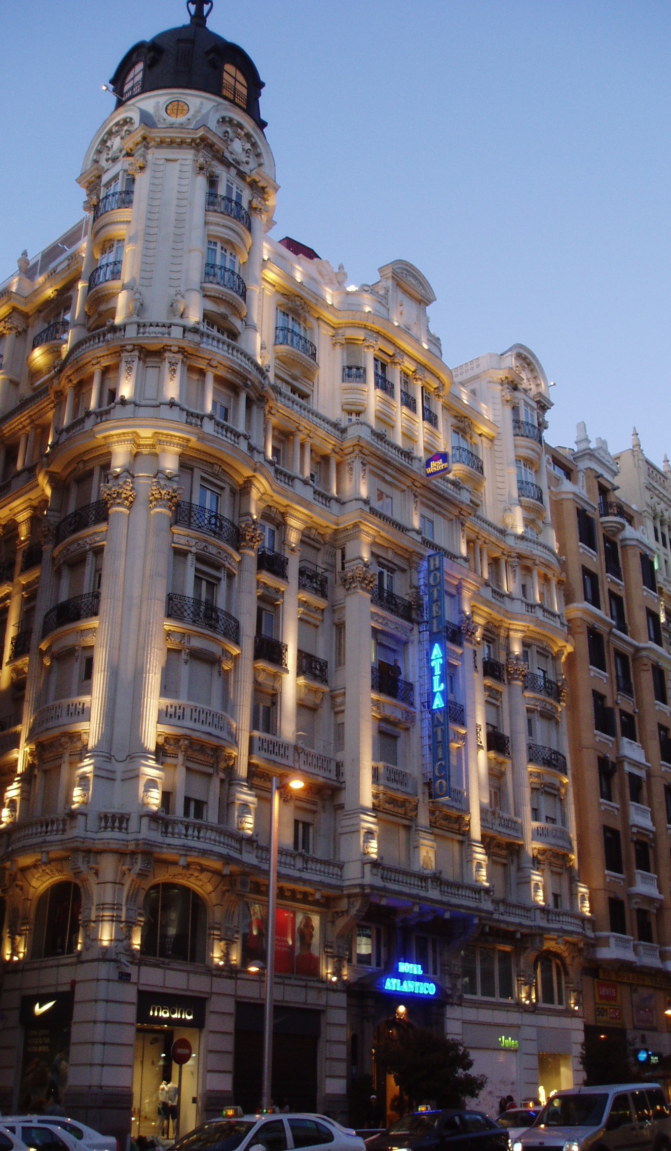 Gran Vía 38, Madrid, España. Hotel Atlántico. Antigua relojería Girod, obra del arquitecto Joaquín Saldana.